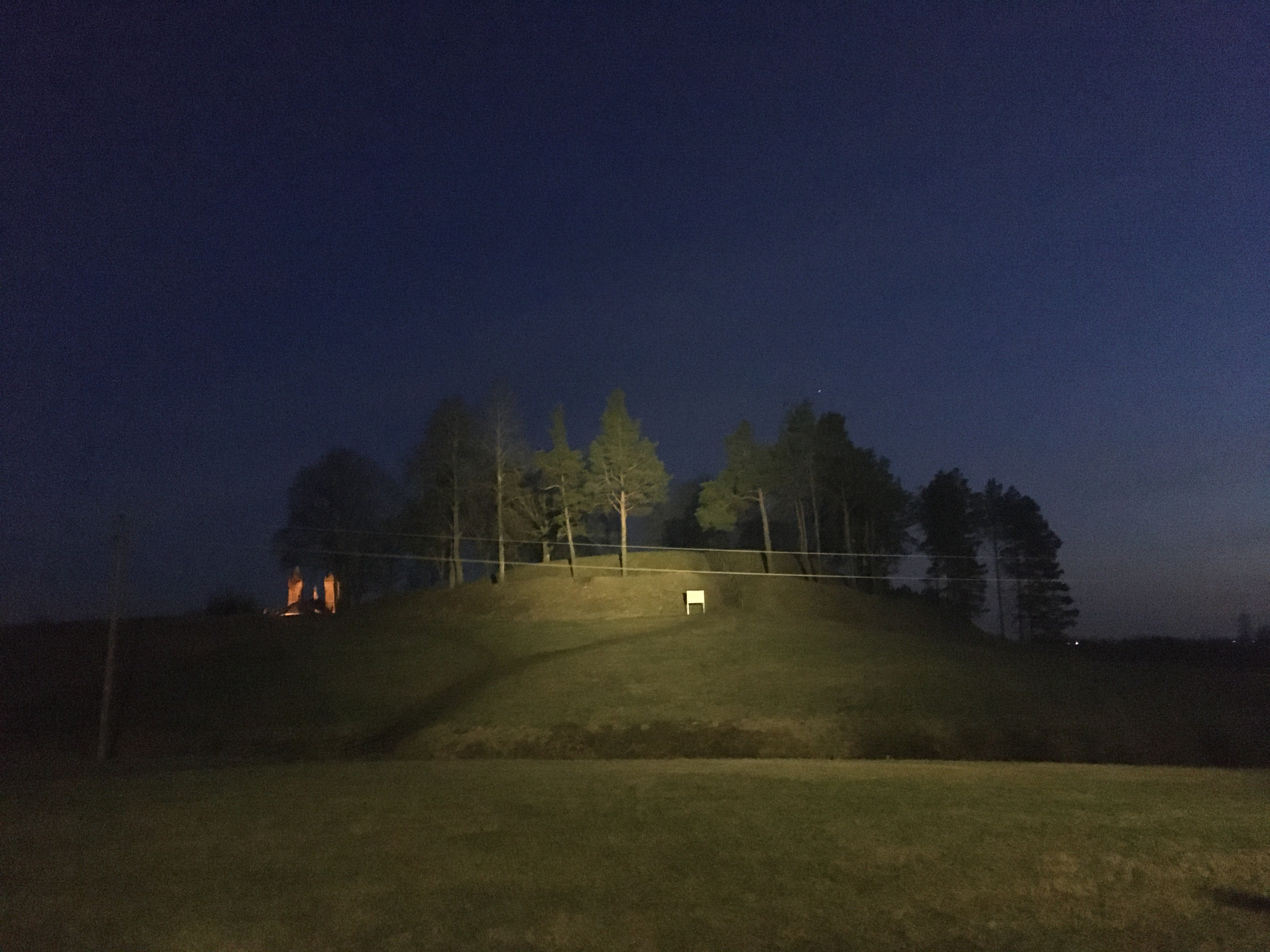 Kupiškio piliakalnis naktį